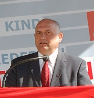 Speech of ABBV chairman Rudy De Leeuw on Workers Day in Leuven, Belgium. Cropped from File:ABBV 1 mei Rudy De Leeuw.jpg